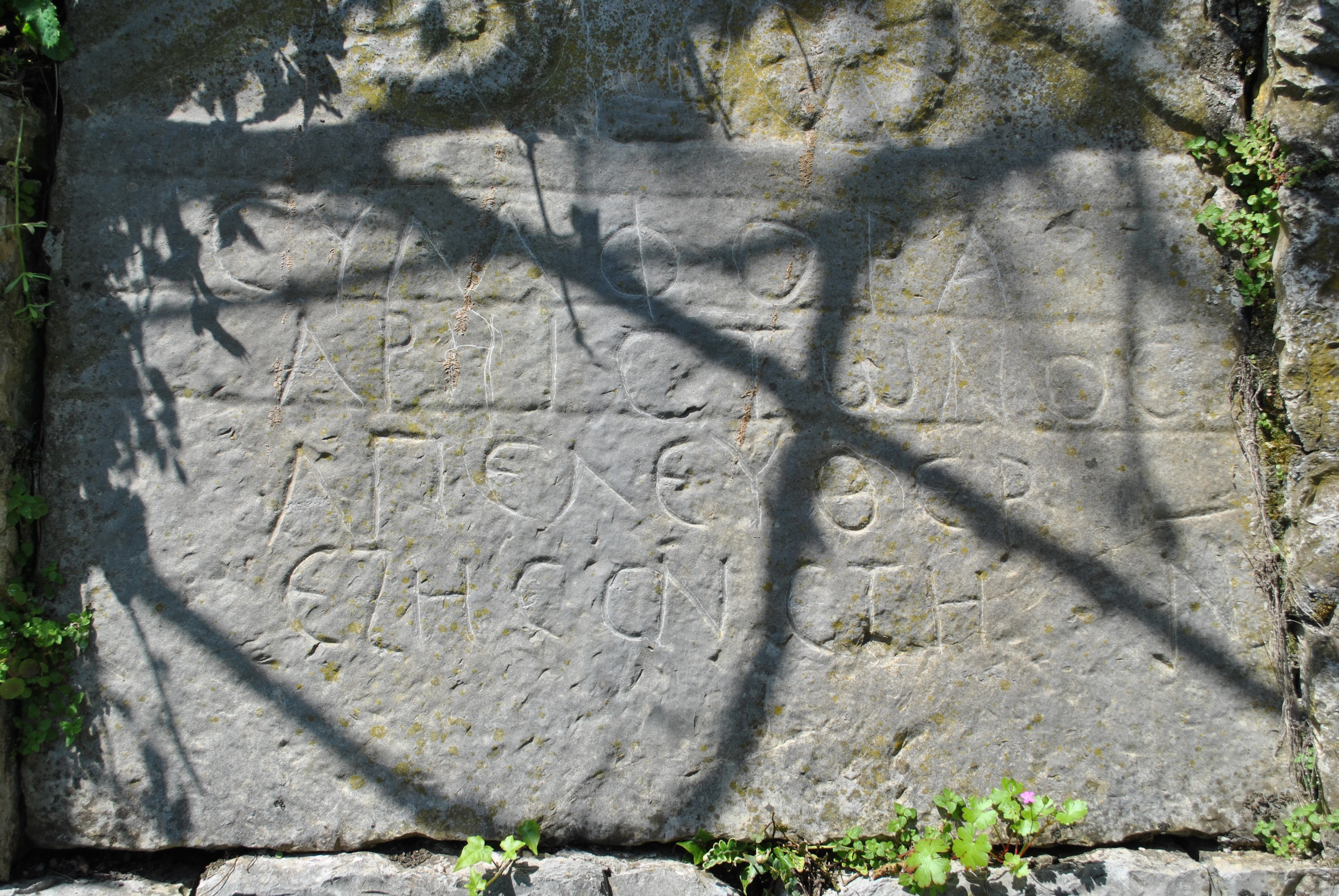 Αρχαία ελληνική επιγραφή στο σπίτι του Φίλιππα Λαμποβιτιάδη στην Δούβιανη